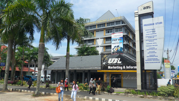 Kampus A